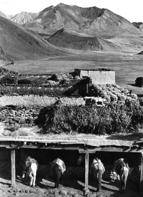 Ralung, Pferdestall im Rasthaus